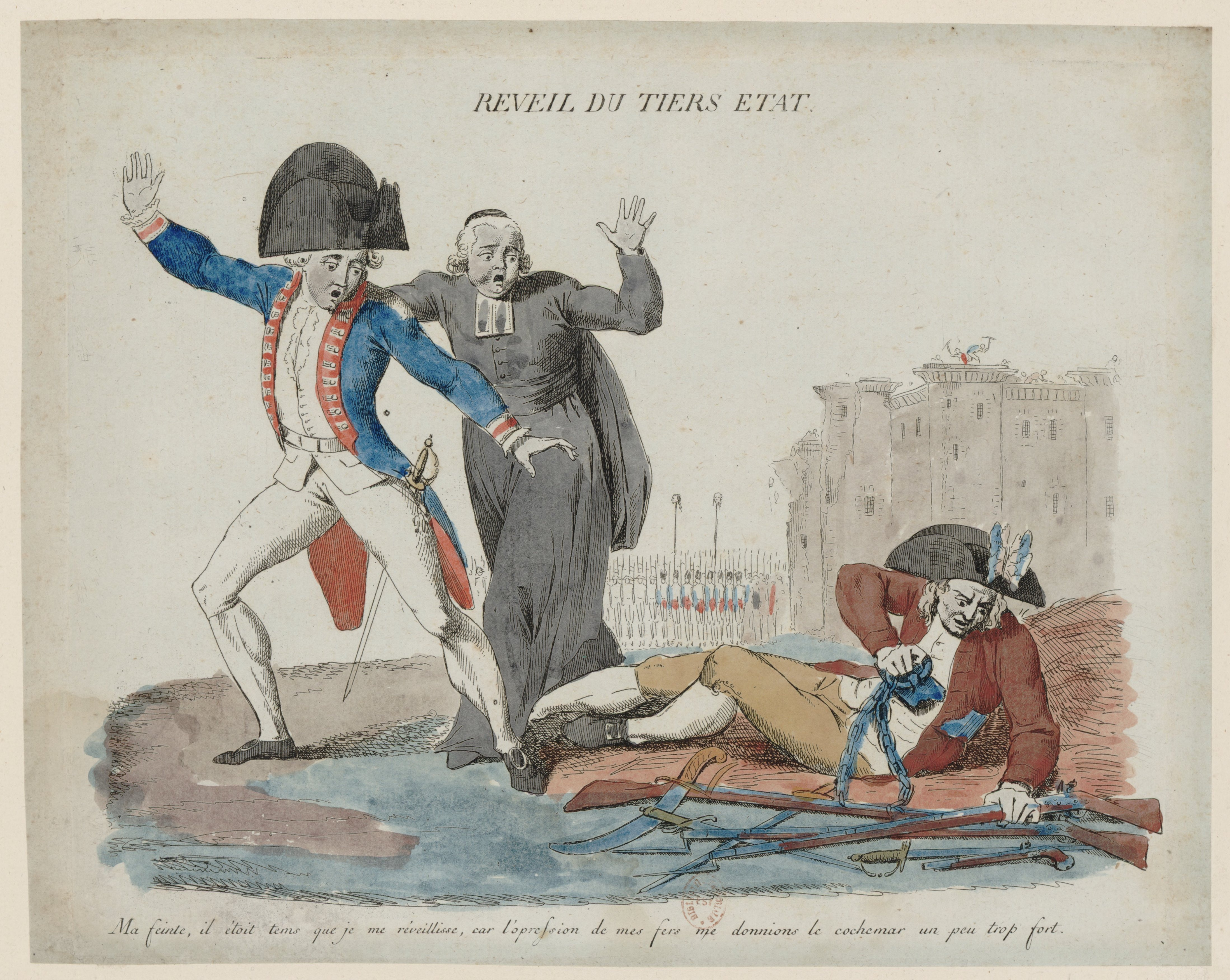 Réveil du Tiers état : ma feinte, il étoit tems que je me réveillisse, car l'opression de mes fers me donnions le cochemar un peu trop fort.